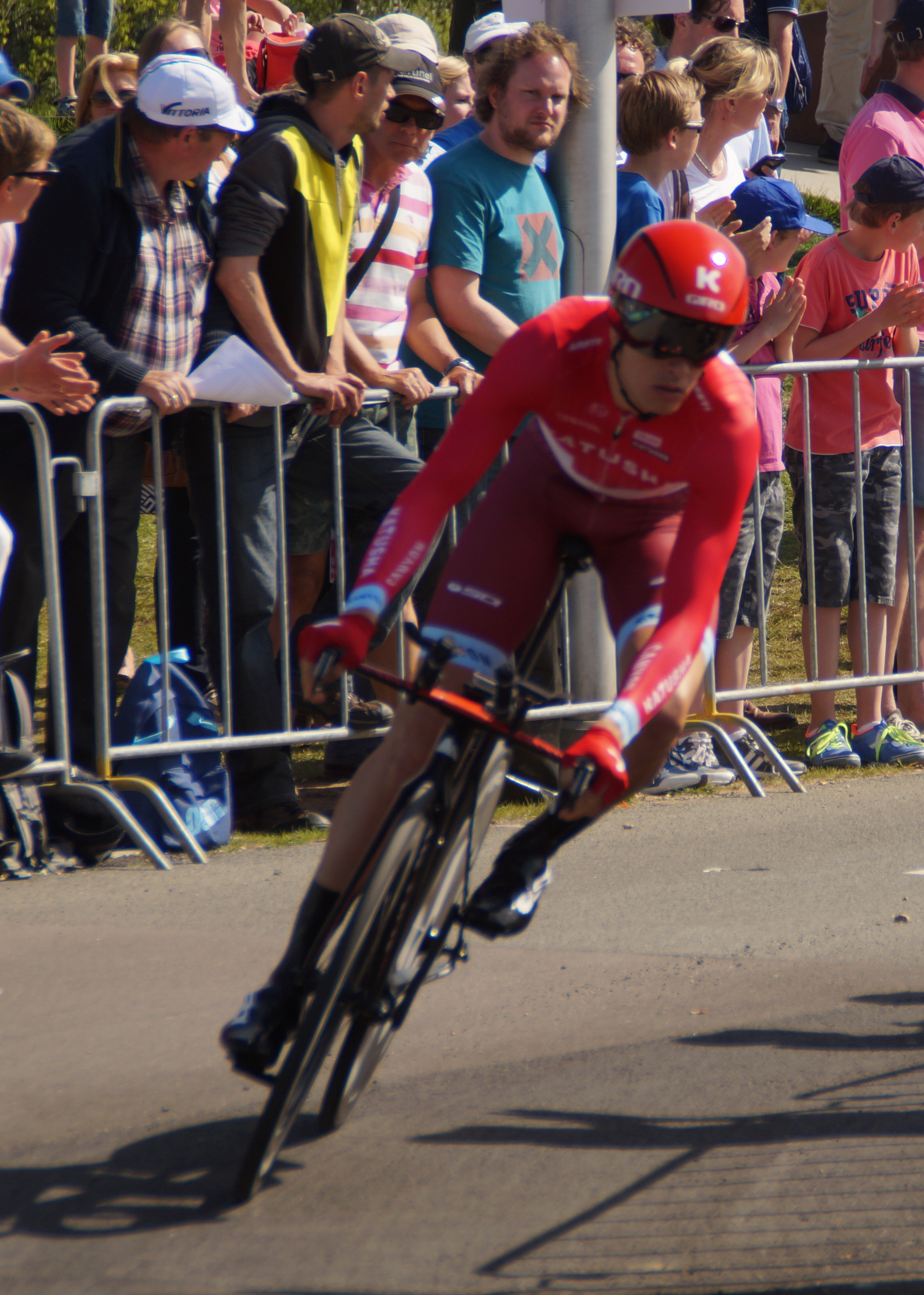 Kochetkov Pavel